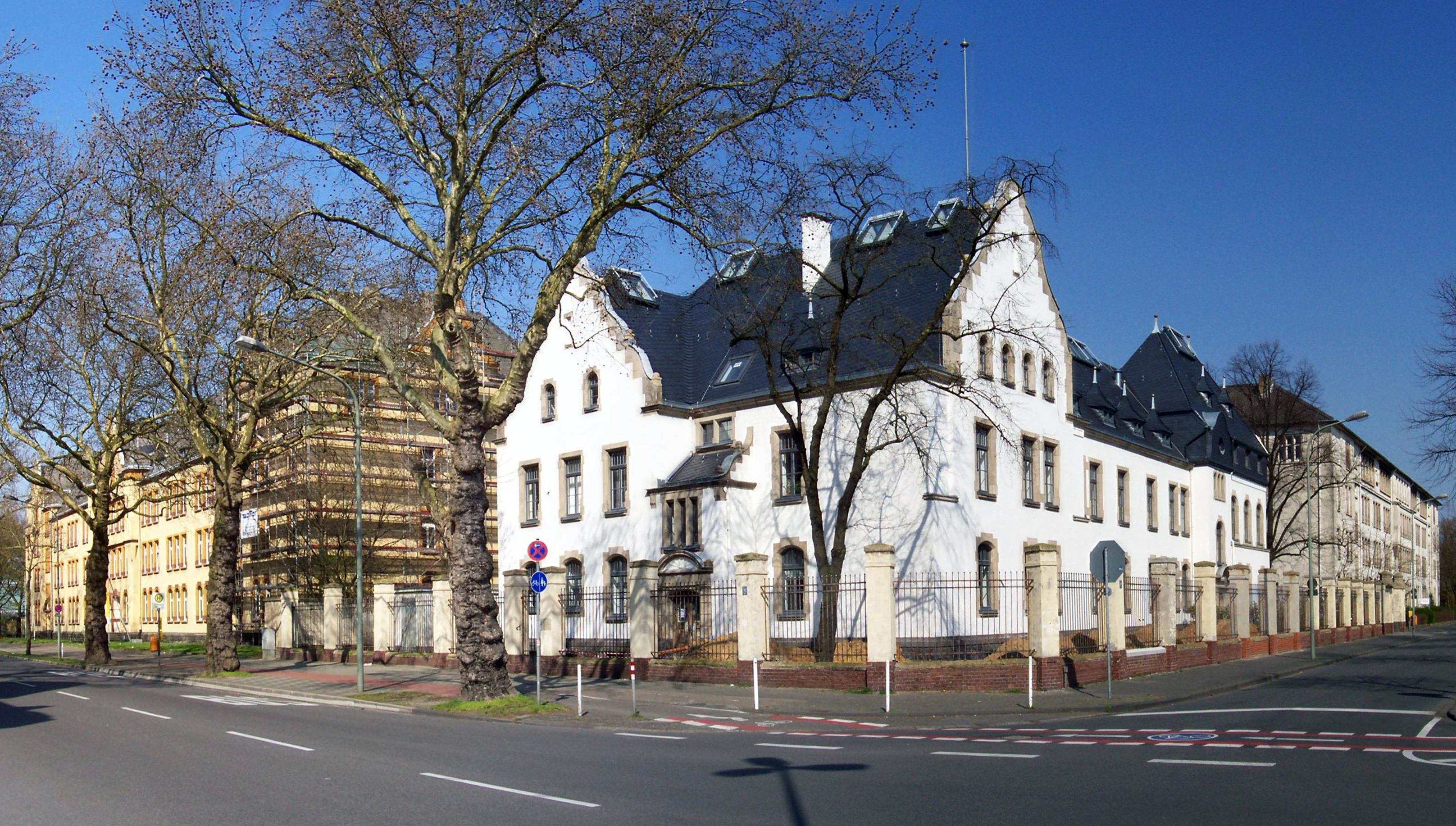 Bildbeschreibung: alte Kaserne der Krefelder Tanzhusaren, Westparkstraße, Krefeld Quelle: selbst fotografiert Fotograf/Zeichner: DER UNFASSBARE